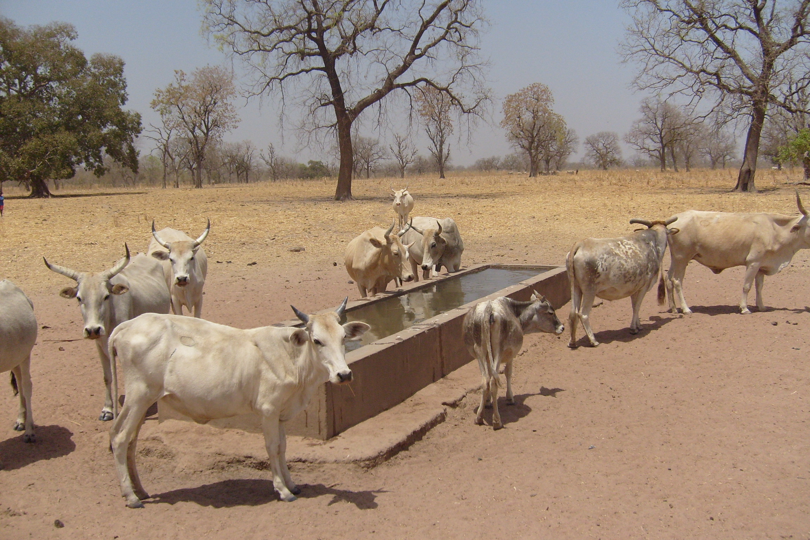 Troupeau à l'abreuvoir à Tambacounda (Sénégal)